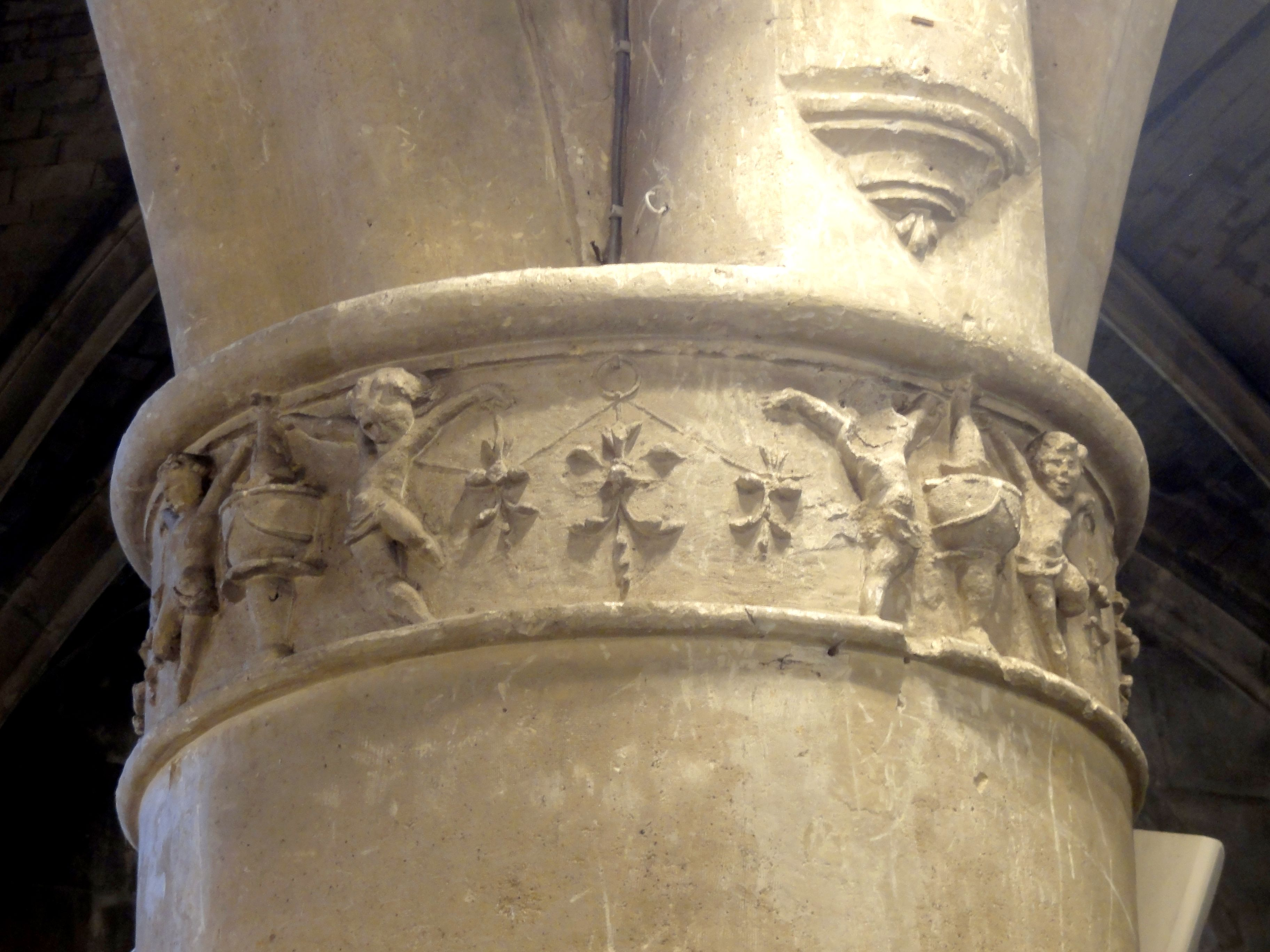 Bas-côté sud, chapiteau du 3e pilier de la nef.